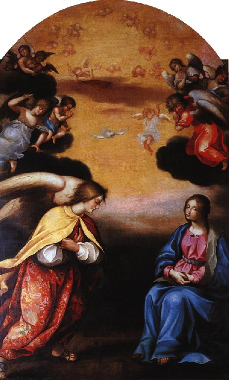 Après la Révolution, l'ancien maître-autel de Notre-Dame des Carmes a été remonté dans le transept sud de l'église Saint-Jean de Caen. Cette œuvre du XVIIe siècle, endommagée en 1944, a été classée au titre d'objet le 2 décembre 1975. Le centre du retable est orné par cette toile représentant l'Annonciation. Elle ne semble pas avoir été conçue pour ce retable. Alors que l'ensemble date de la fin du XVIIe siècle, il semble que le tableau soit antérieur à 1620.